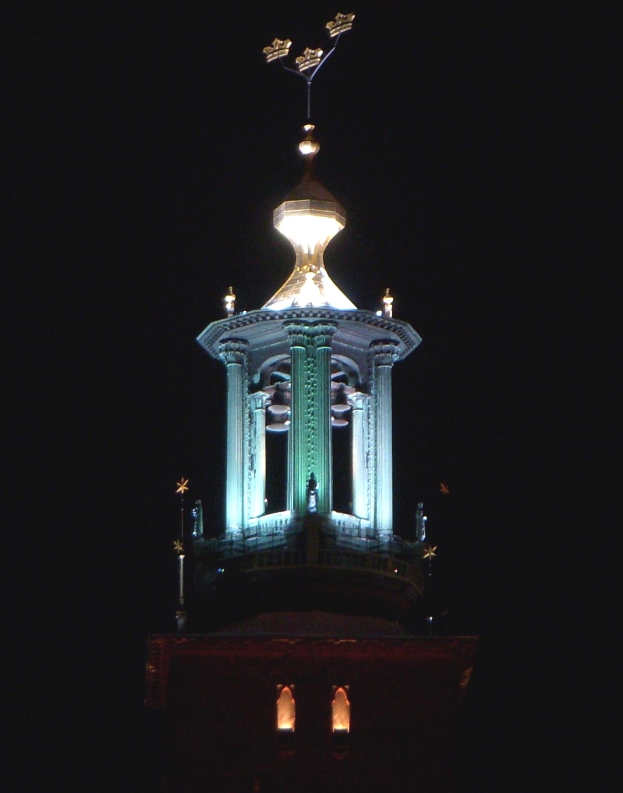 Stockholms stadshus, tornet med kvällsbelysning